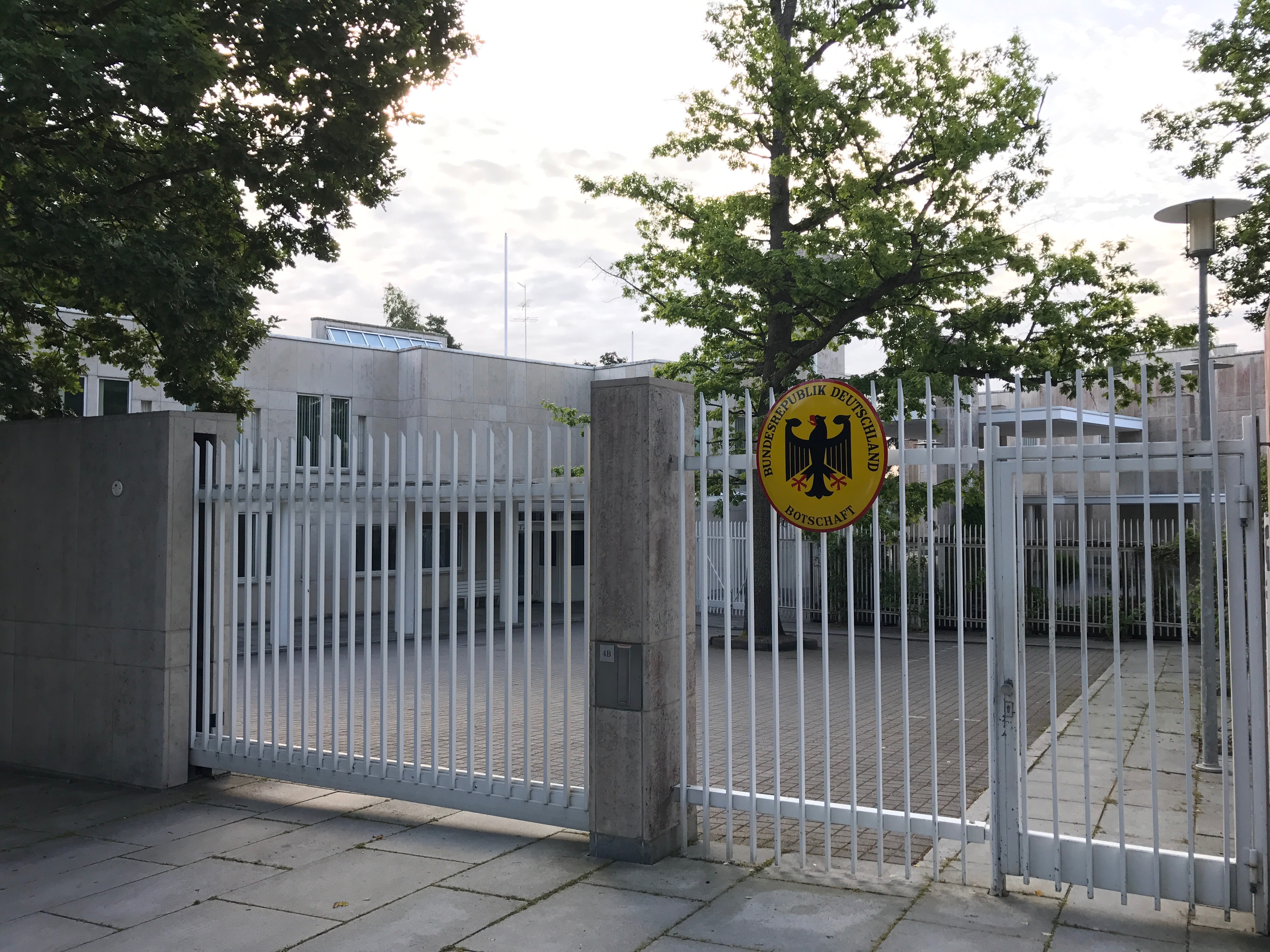 Saksan liittotasavallan Helsingin-suurlähetystö Kuusisaaressa osoitteessa Krogiuksentie 4.